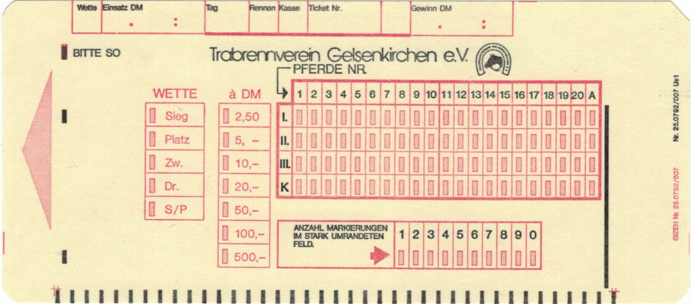 Wettkarte Gesentrab 1980er Jahre